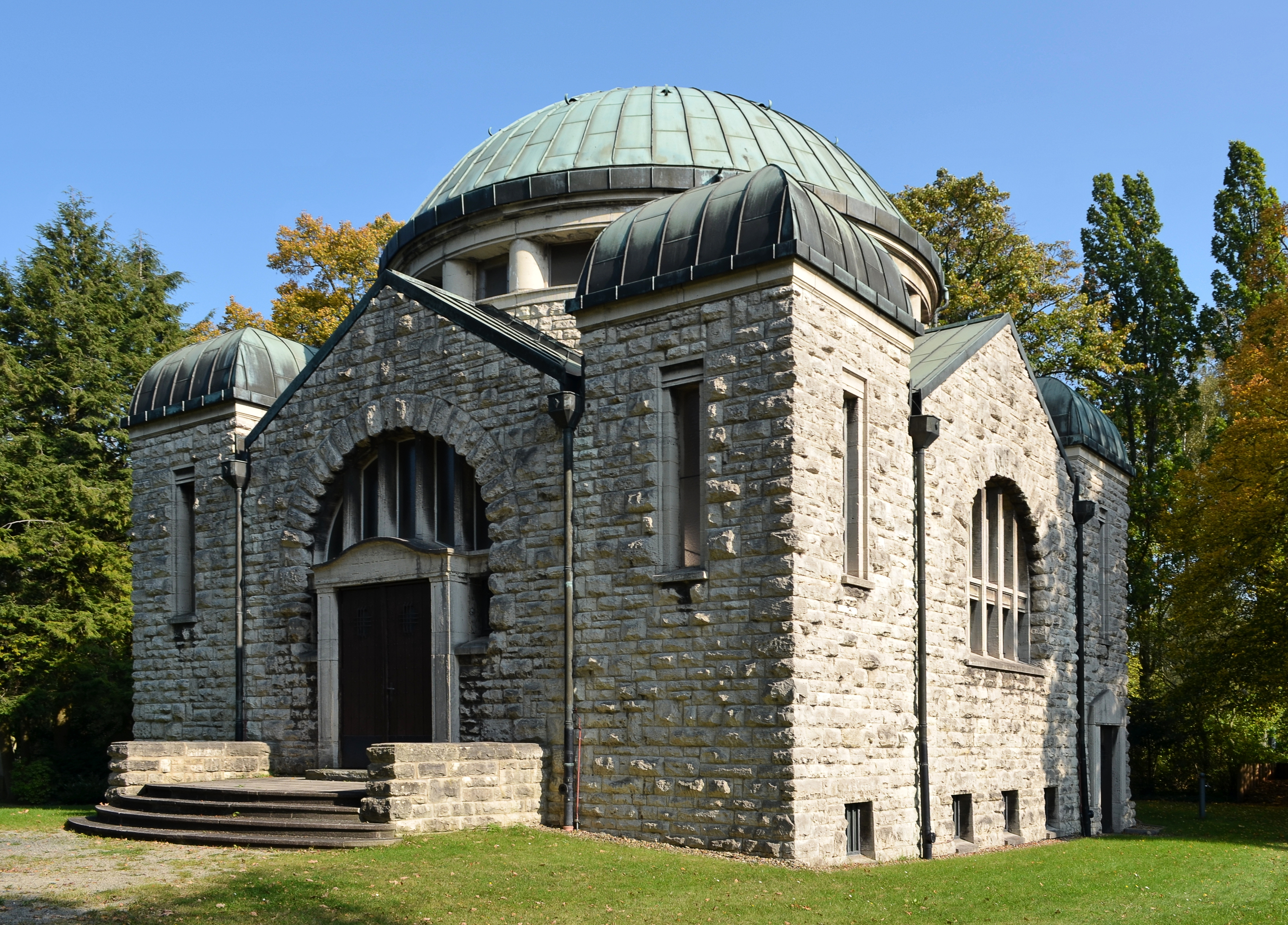 Braunschweig, Jüdischer Friedhof, Helmstedter Straße: Eingansgseite der Kapelle von Georg Lübke. Ansicht von Südwesten.